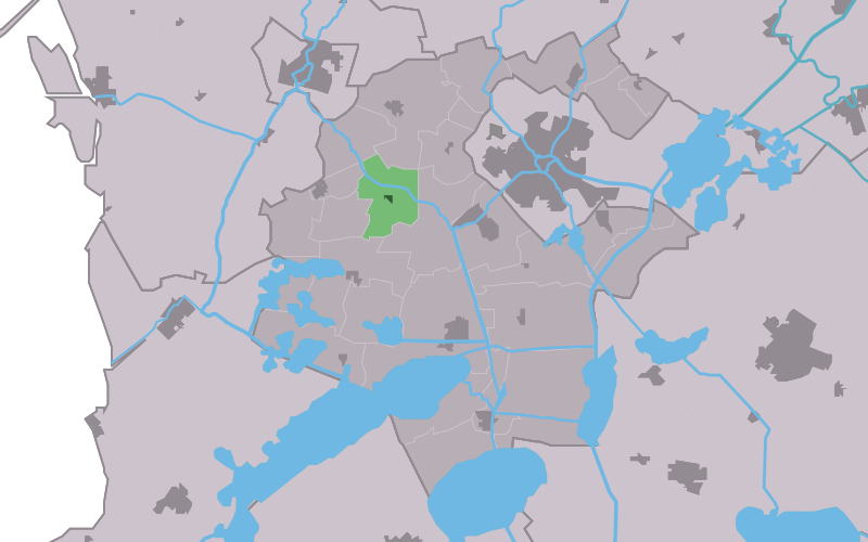 Kaartsje fan himrik fan Abbegea